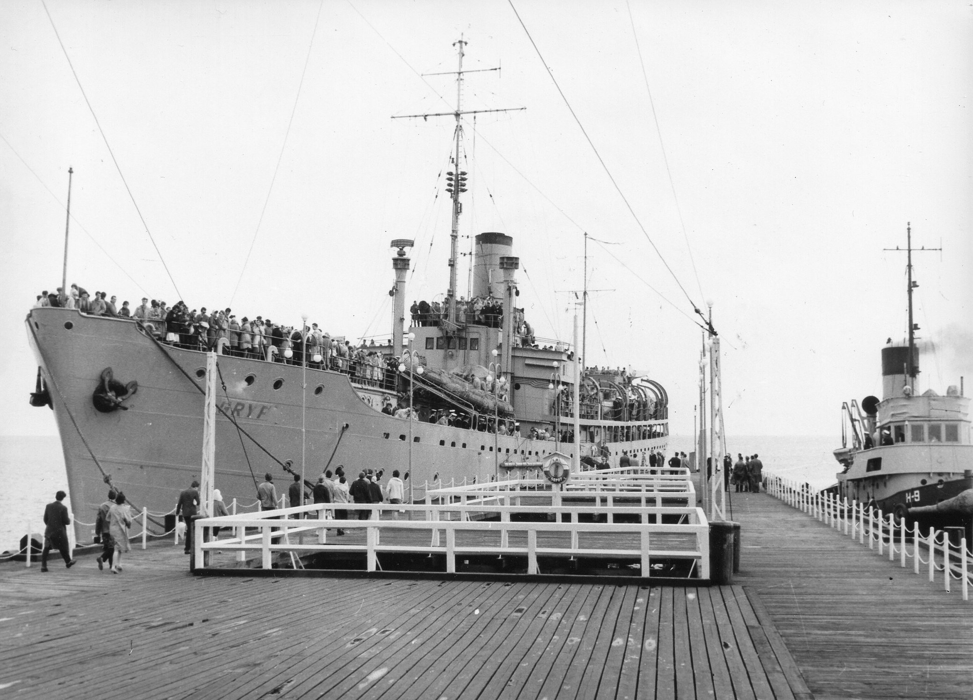 eng.: Polish school-ship ORP "Gryf" by the pier in Sopotpol.: Polski okręt szkolny ORP "Gryf" przy molo w Sopocie